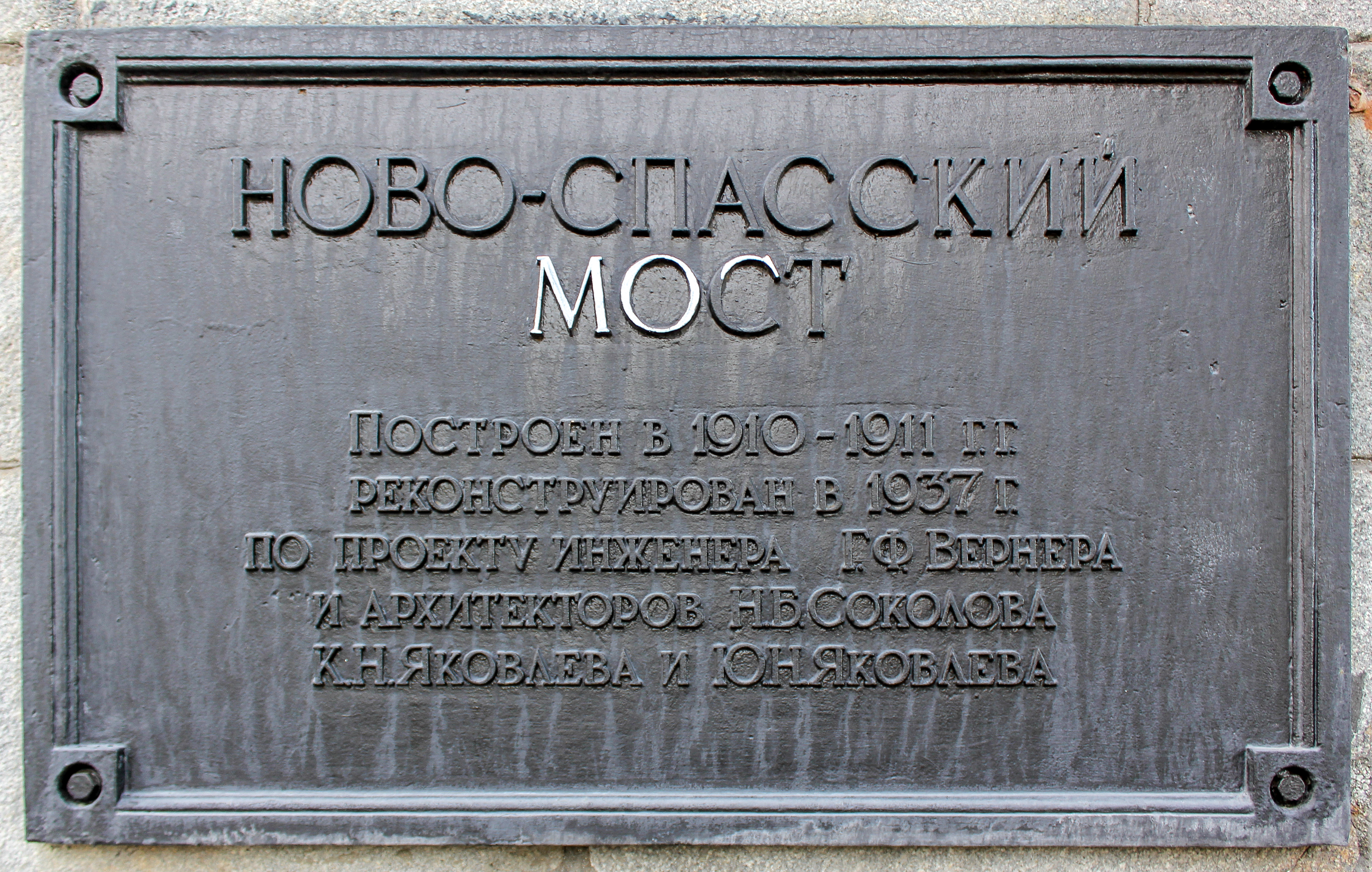 Вид на Новоспасский мост